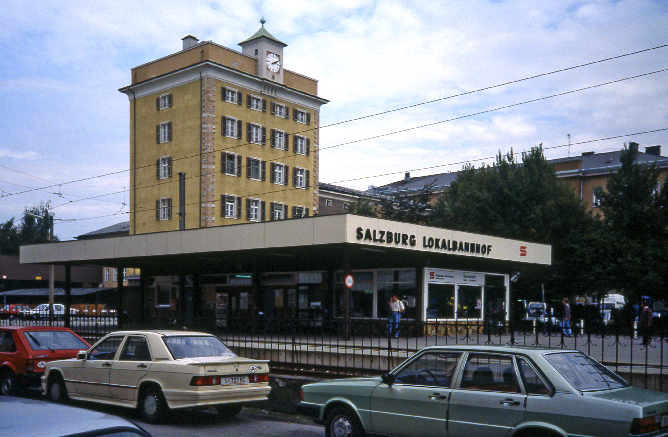 Salzburger Lokalbahnhof (Sommer 1992)